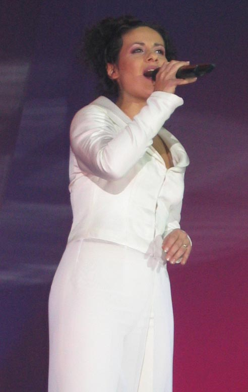 Darja Švajger, slovenian pop singer photo:Ziga 10:12, 10 February 2007 (UTC)